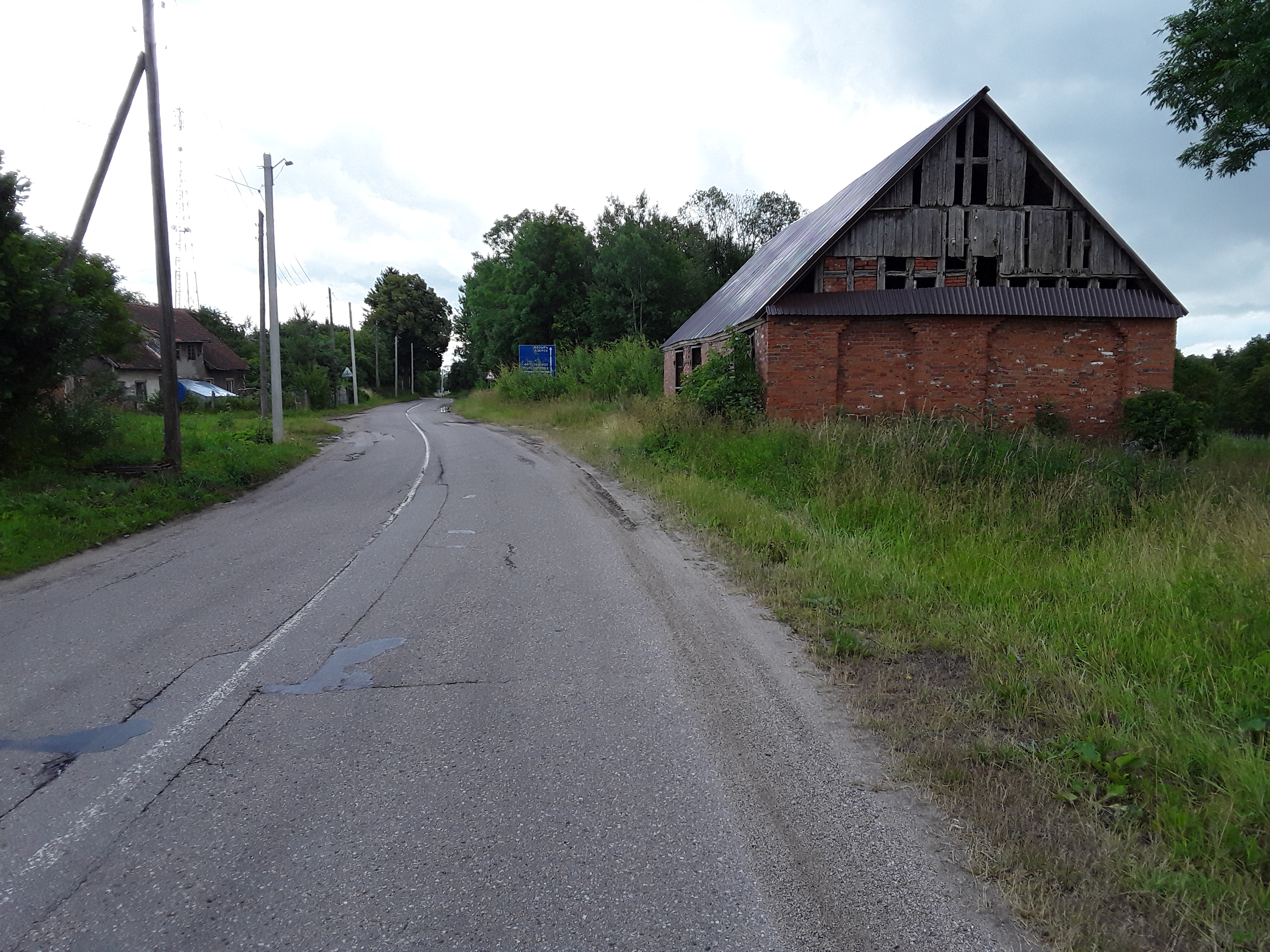 Muldszen / Mulden, Hauptstraße